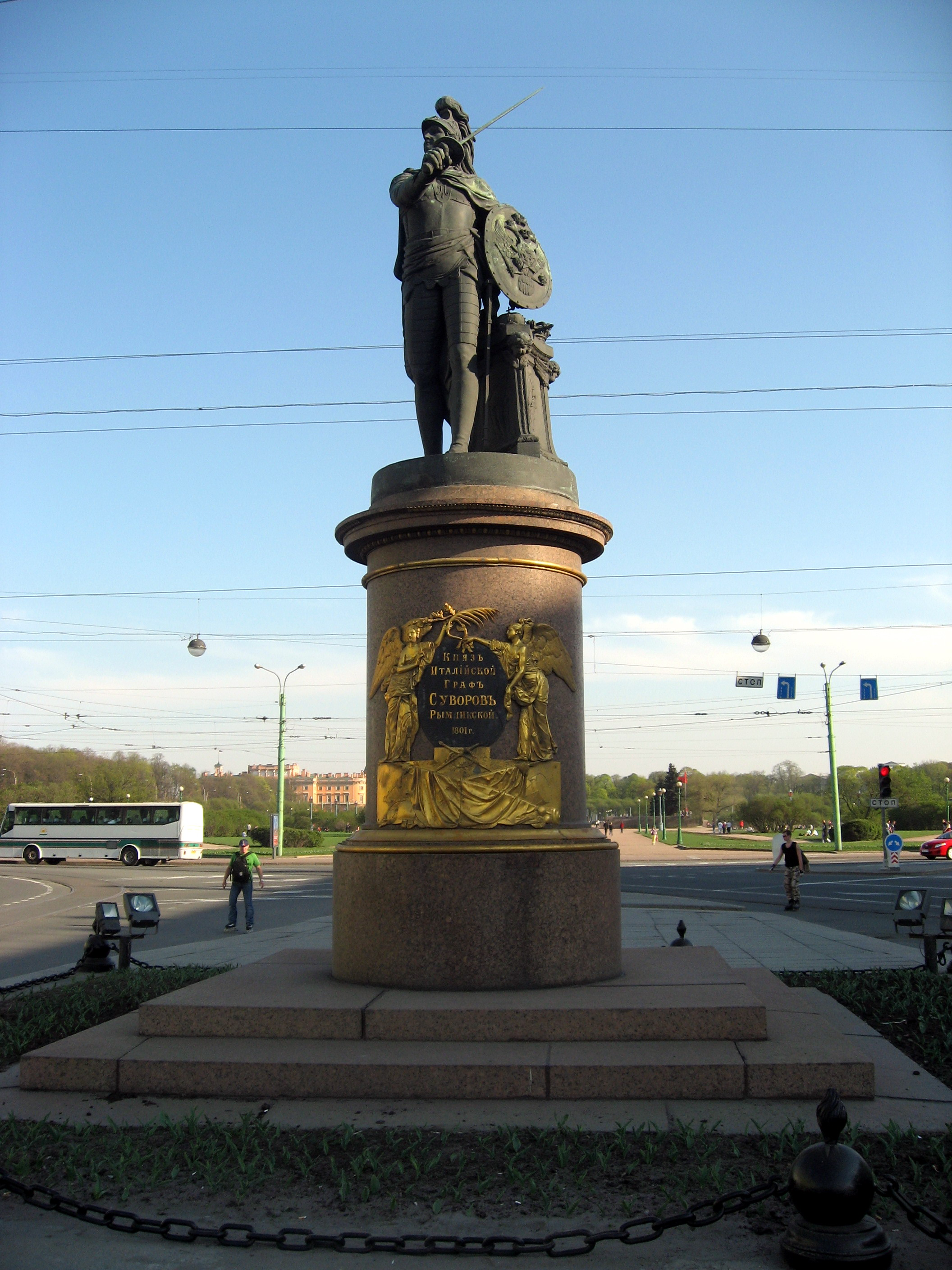 Sankt-Petěrburg